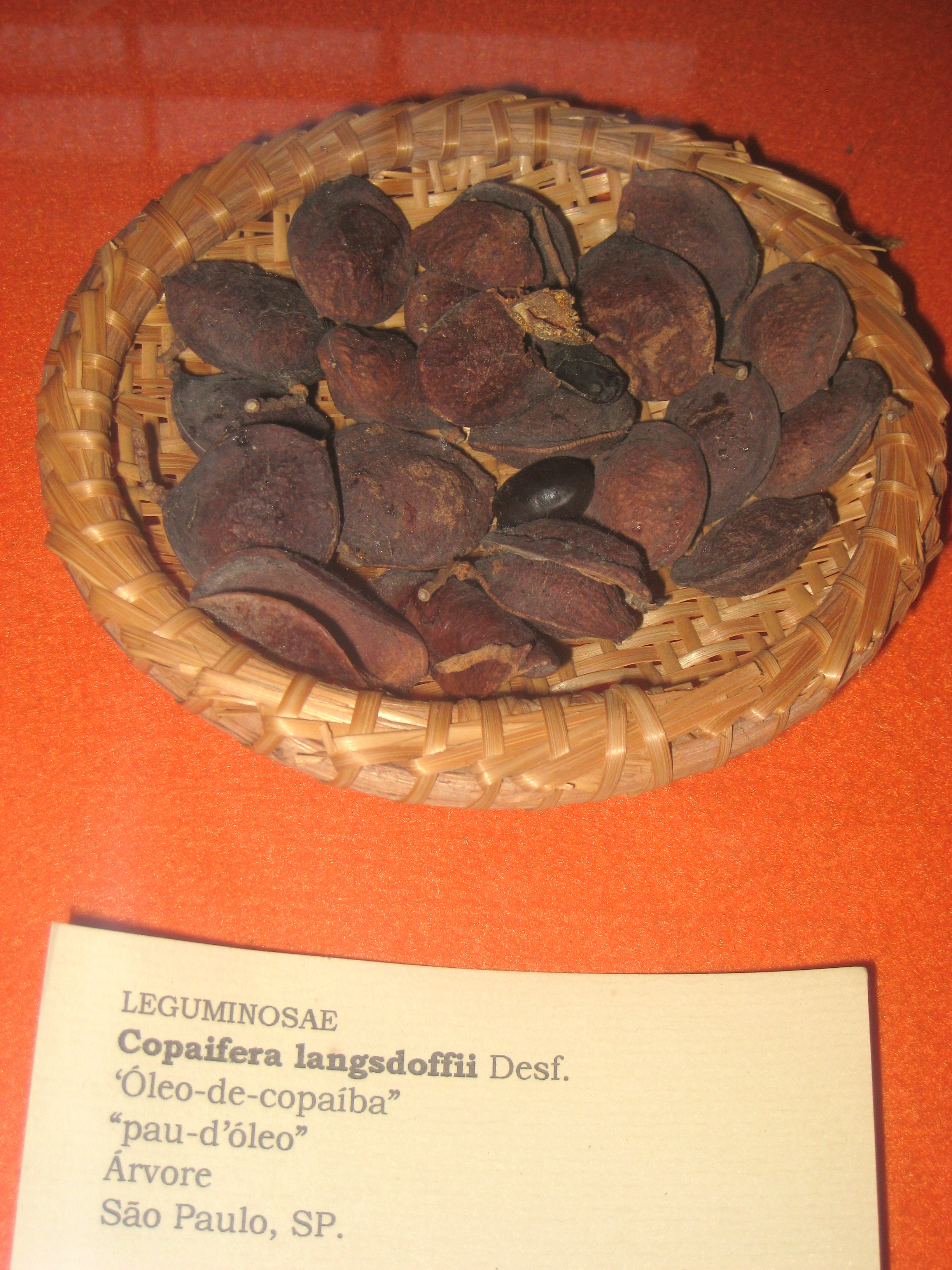 Copaifera langsdorfii specimen in the Museu Botânico Dr. João Barbosa Rodrigues, Jardim Botânico de São Paulo, São Paulo City, SP, Brazil.